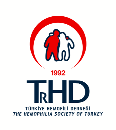 Derneğin Logosu